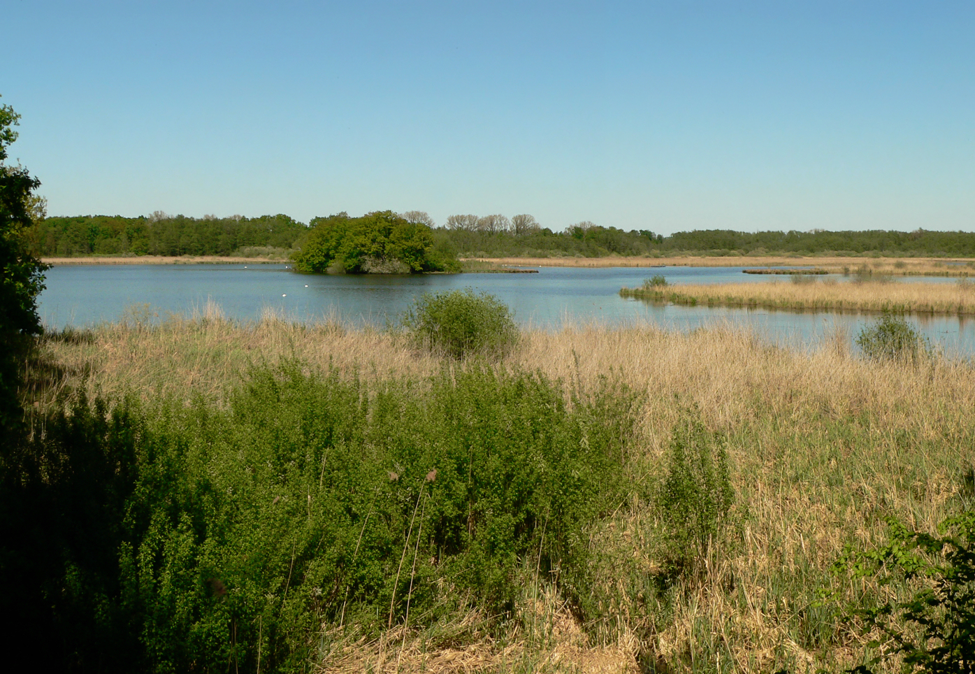 Schapenbruchteich von Beobachtungsplattform gesehen